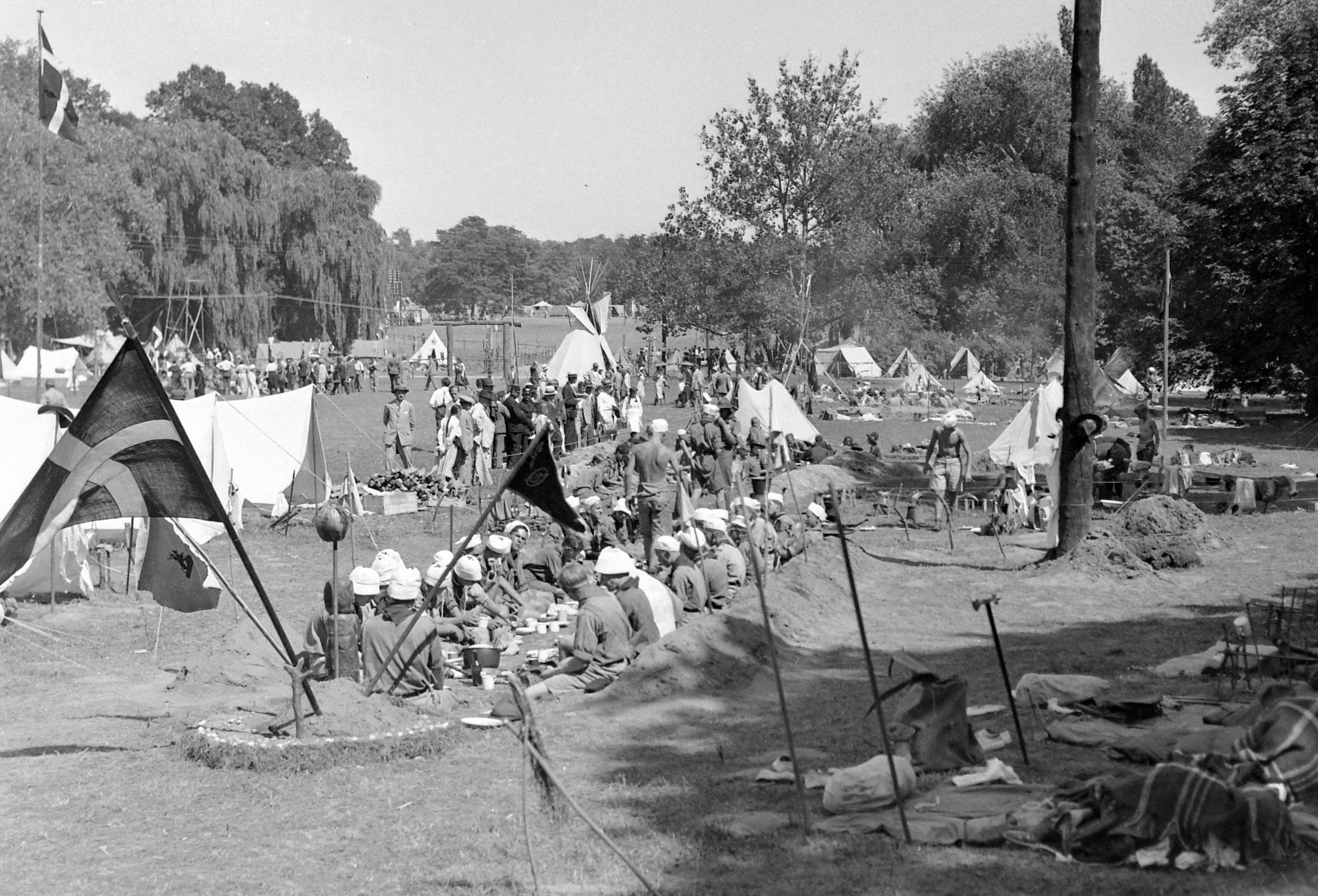 4. Nemzetközi Cserkész Világtalálkozó (Jamboree). Location: Hungary, Gödöllő Tags: tent, flag, genre painting, camp Title: 4. Nemzetközi Cserkész Világtalálkozó (Jamboree).